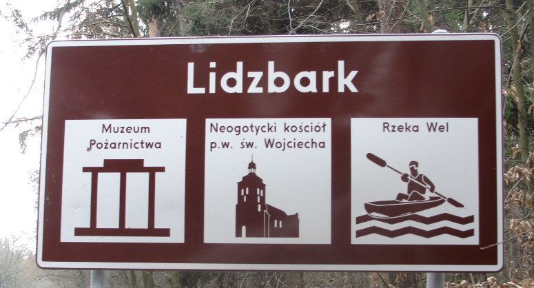 Znak turystyczny umieszczony przy drodze nr 541 Lubawa-Lidzbark